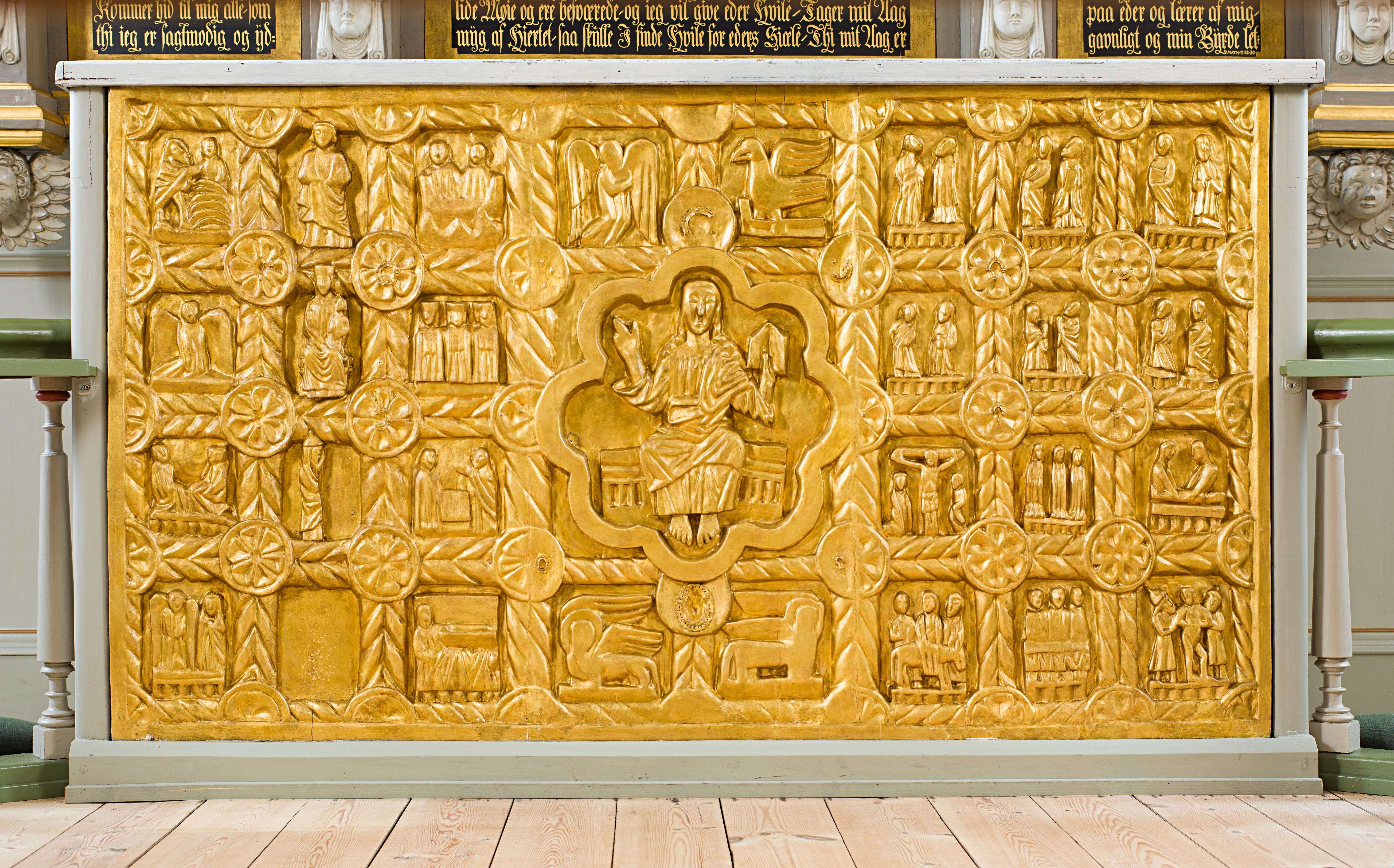 DK Ringkøbing 1866, fig. 28. Alterbordsforside, o. 1275-1300.